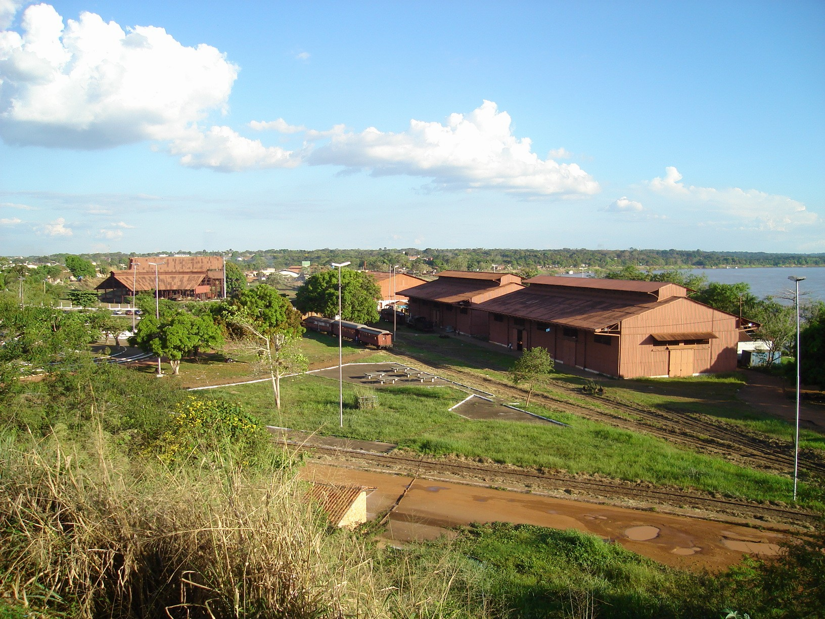 Estrada de Ferro Madeira Mamoré em Porto Velho, Rondônia, Brasil